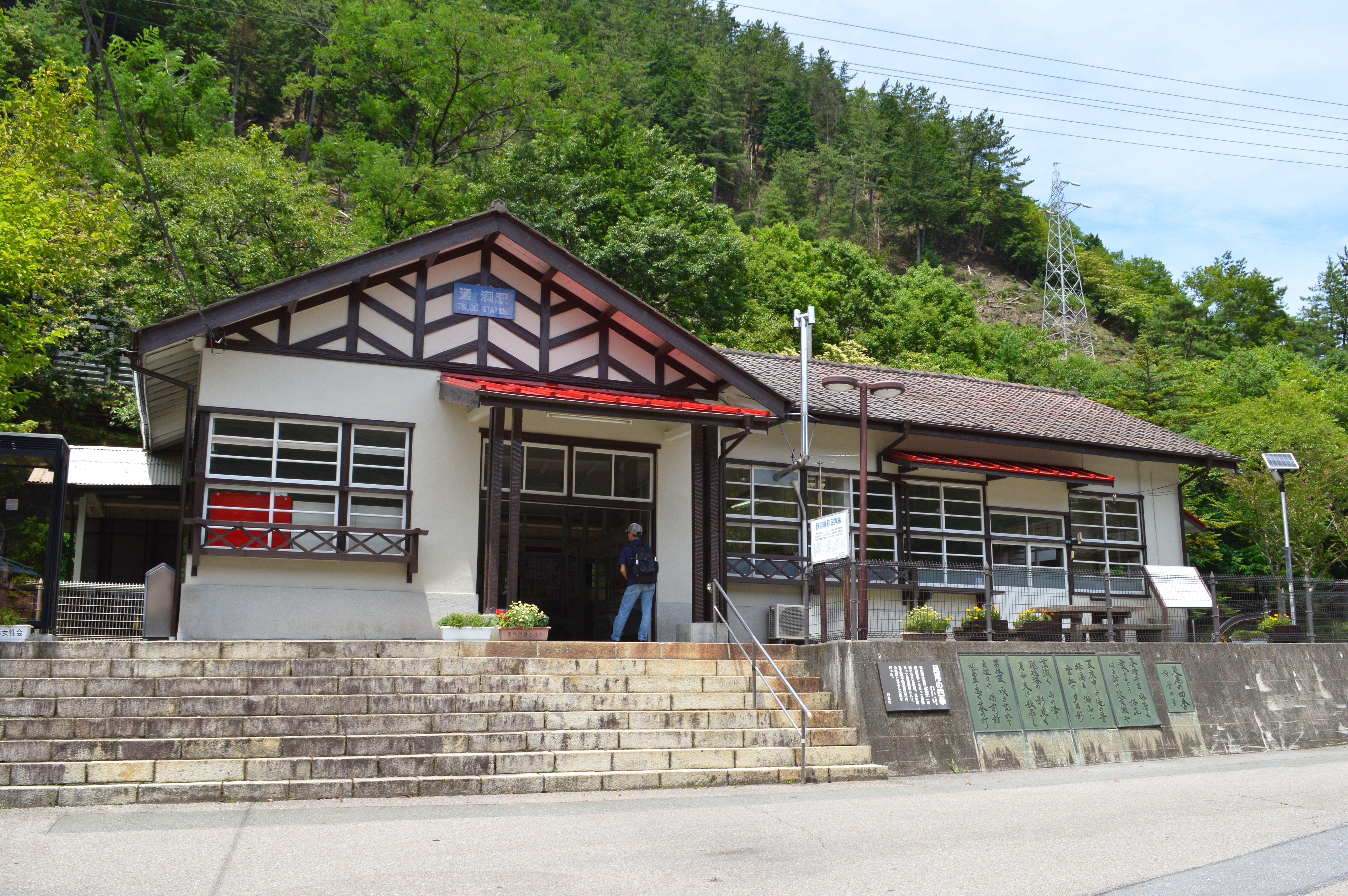 通洞駅 駅舎